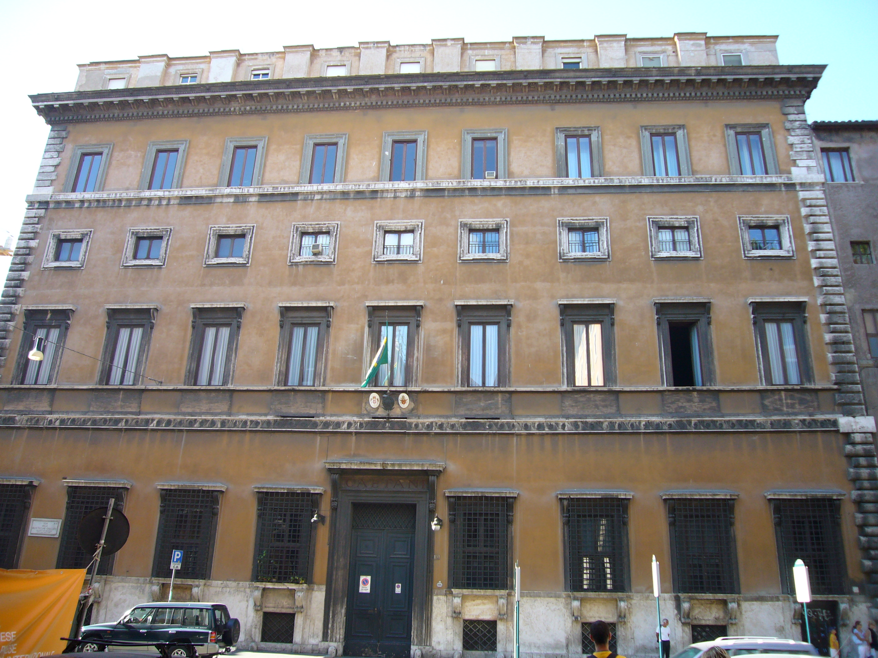 Roma, palazzo Mattei Caetani su via delle Botteghe Oscure